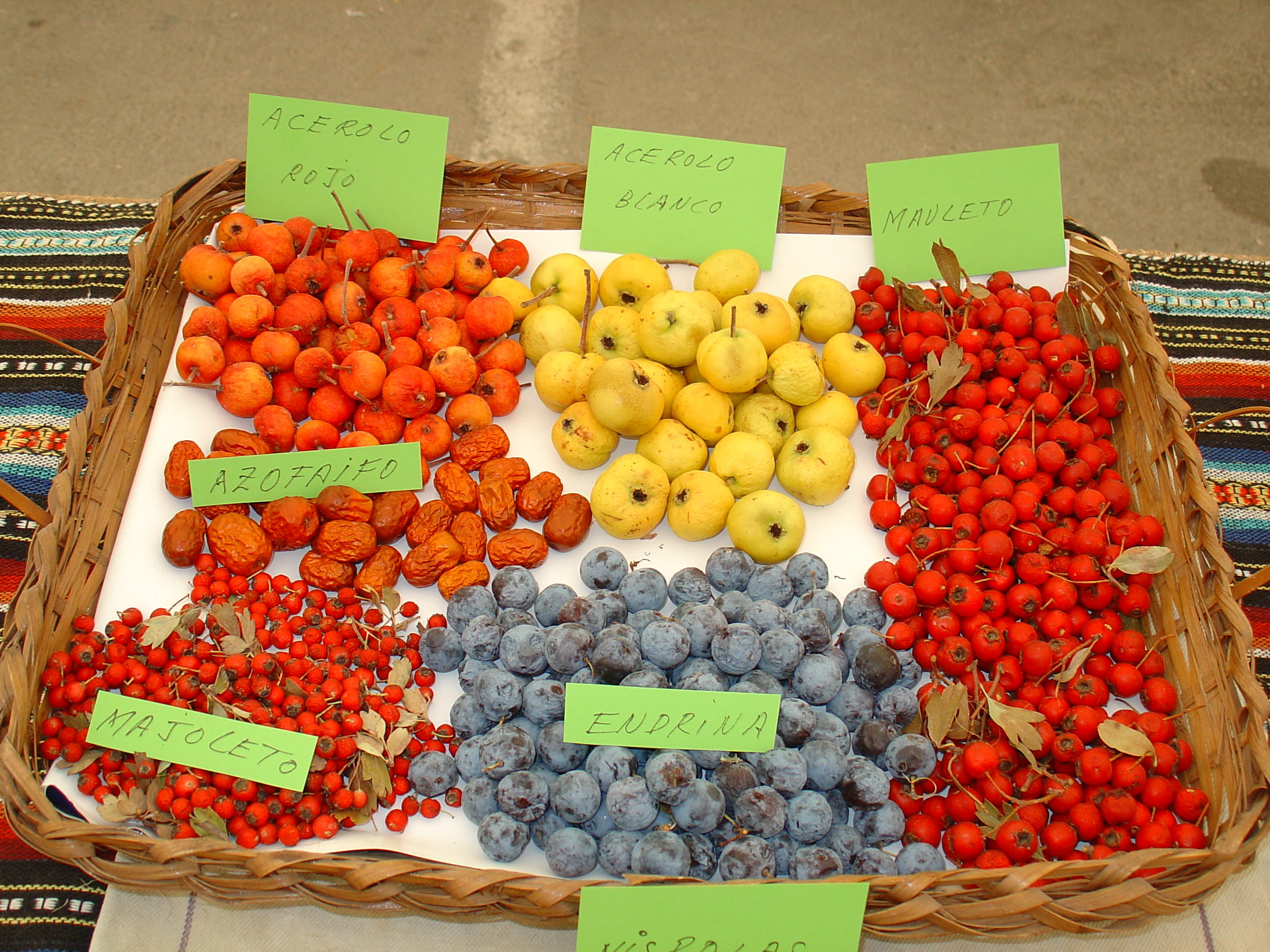 Bandeja de frutos otoñales o «níspolas»: acerolo anaranjado (no «rojo»), acerolo amarillo («blanco») y «mauleto» o acerolo rojo (Crataegus azarolus); majoleto (Crataegus monogyna), azofaifo (Ziziphus jujuba) y endrina (Prunus spinosa).